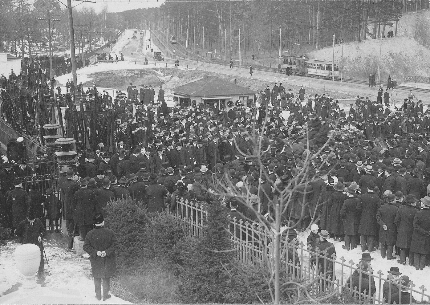 Folksamling vid Norra begravningsplatsen vid August Palms begravning